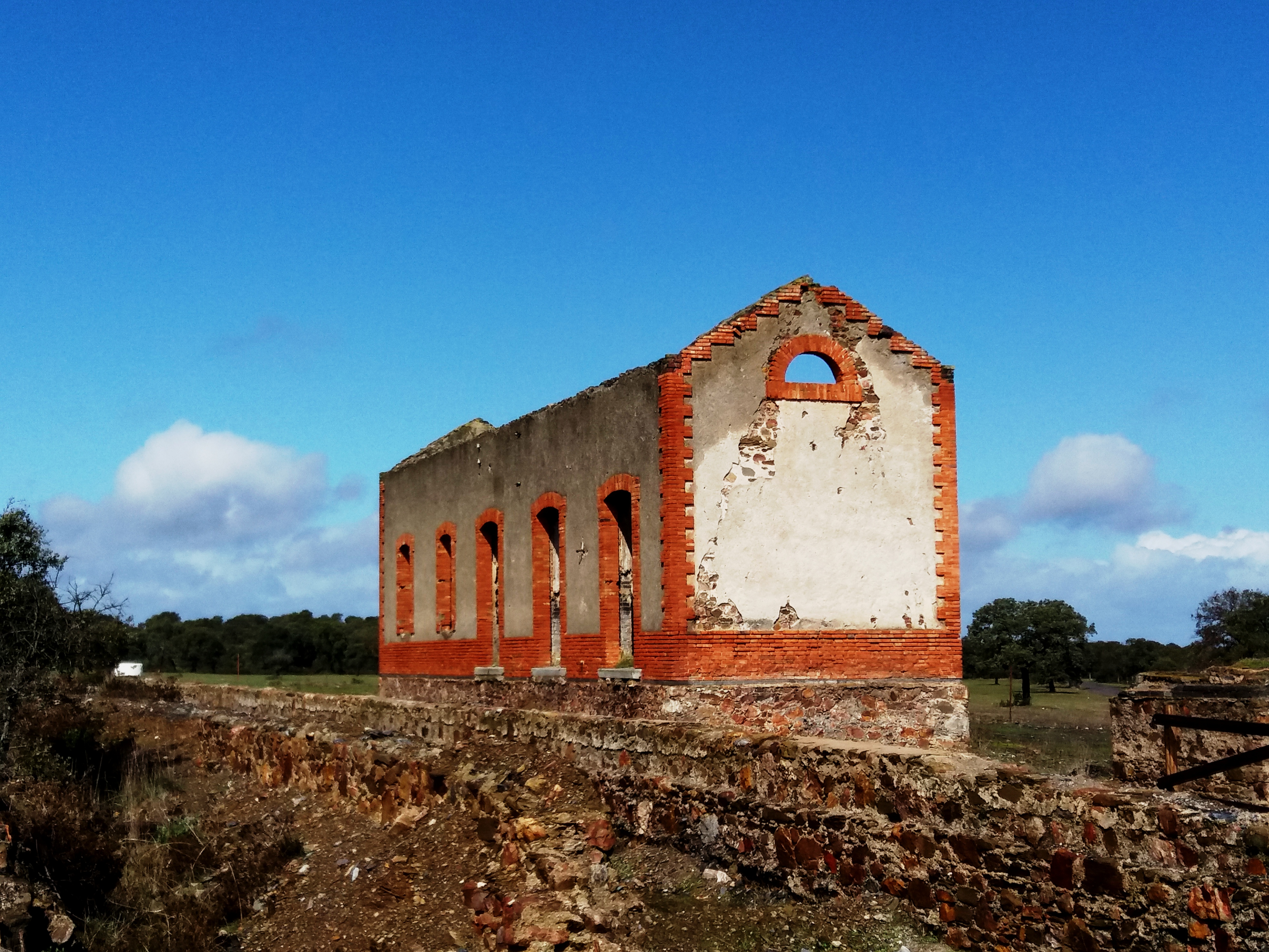 Estación de Peñas Blancas, actualmente (marzo de 2018) abandonada, en el término municipal de Villanueva del Duque (Córdoba, España)